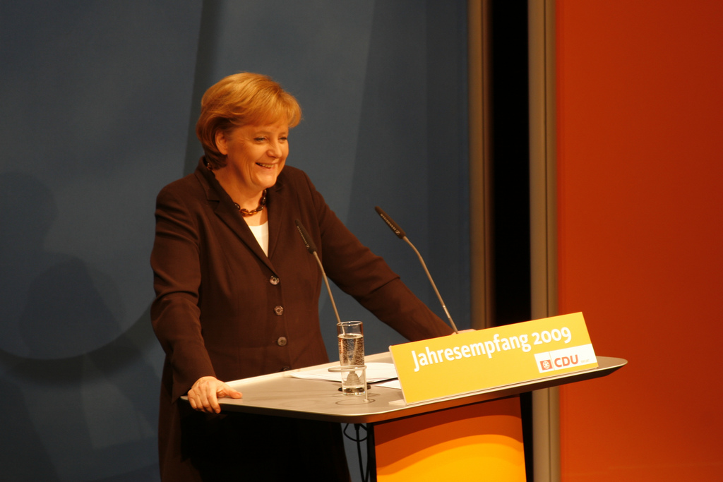 Bundeskanzlerin Dr. Angela Merkel